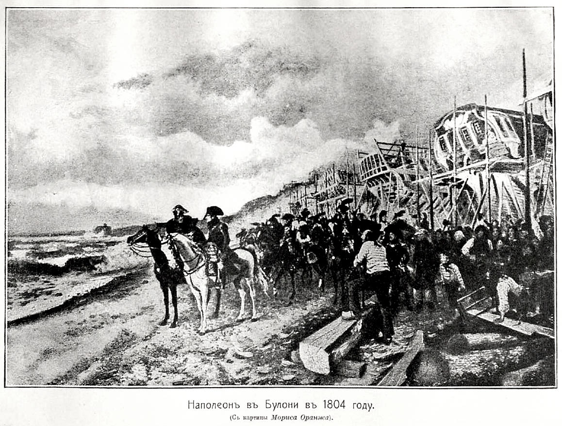 Данное изображение было использовано в статье «Булонская флотилия» опубликованной в пятом томе «Военной энциклопедии», который был издан книгоиздательским товариществом Ивана Дмитриевича Сытина в 1911 году в столице Российской империи городе Санкт-Петербурге.